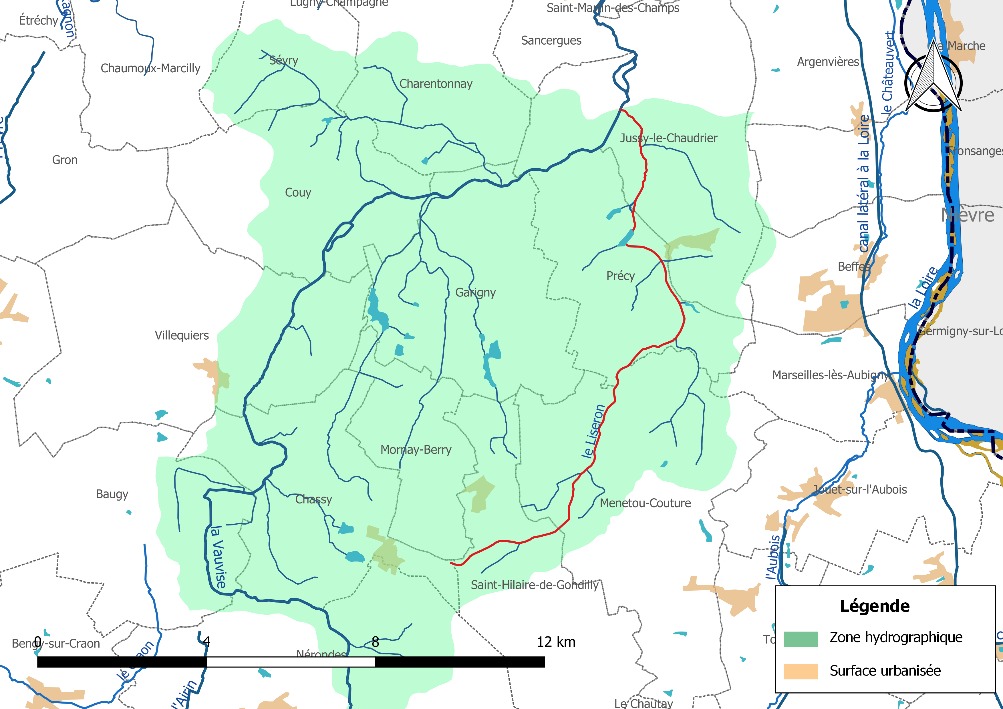 Carte du cours d'eau « le Liseron », affluent de la Vauvise (France) et de la zone hydrographique dans laquelle il s'insère.